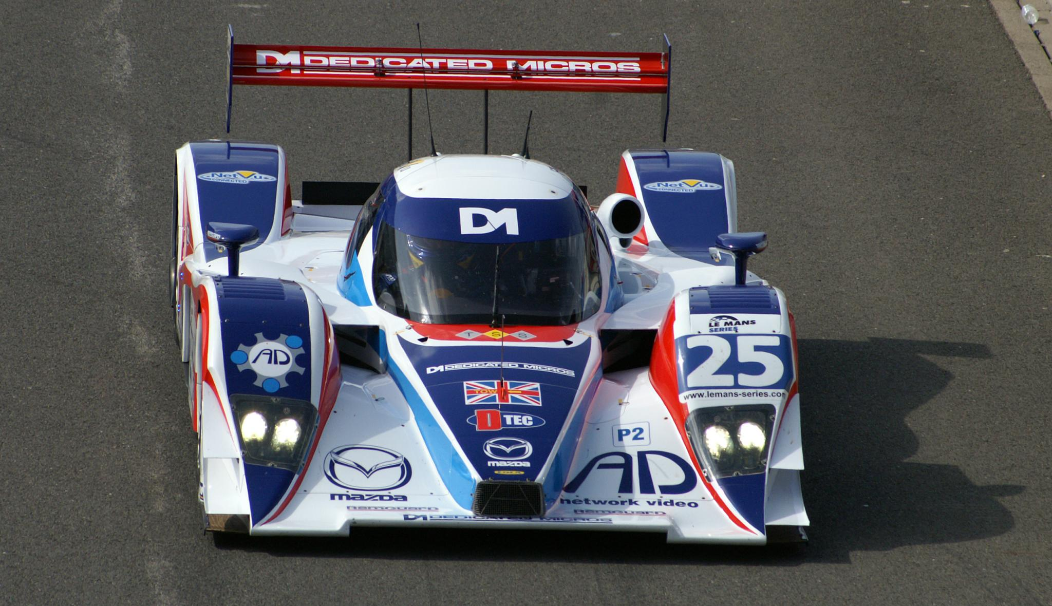 Silverstone Le Mans Series 1000K